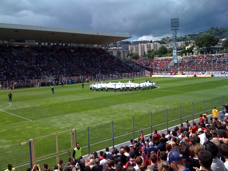 Présentation du nouveau logo de l'OGCN au Ray le 19 mai 2013.